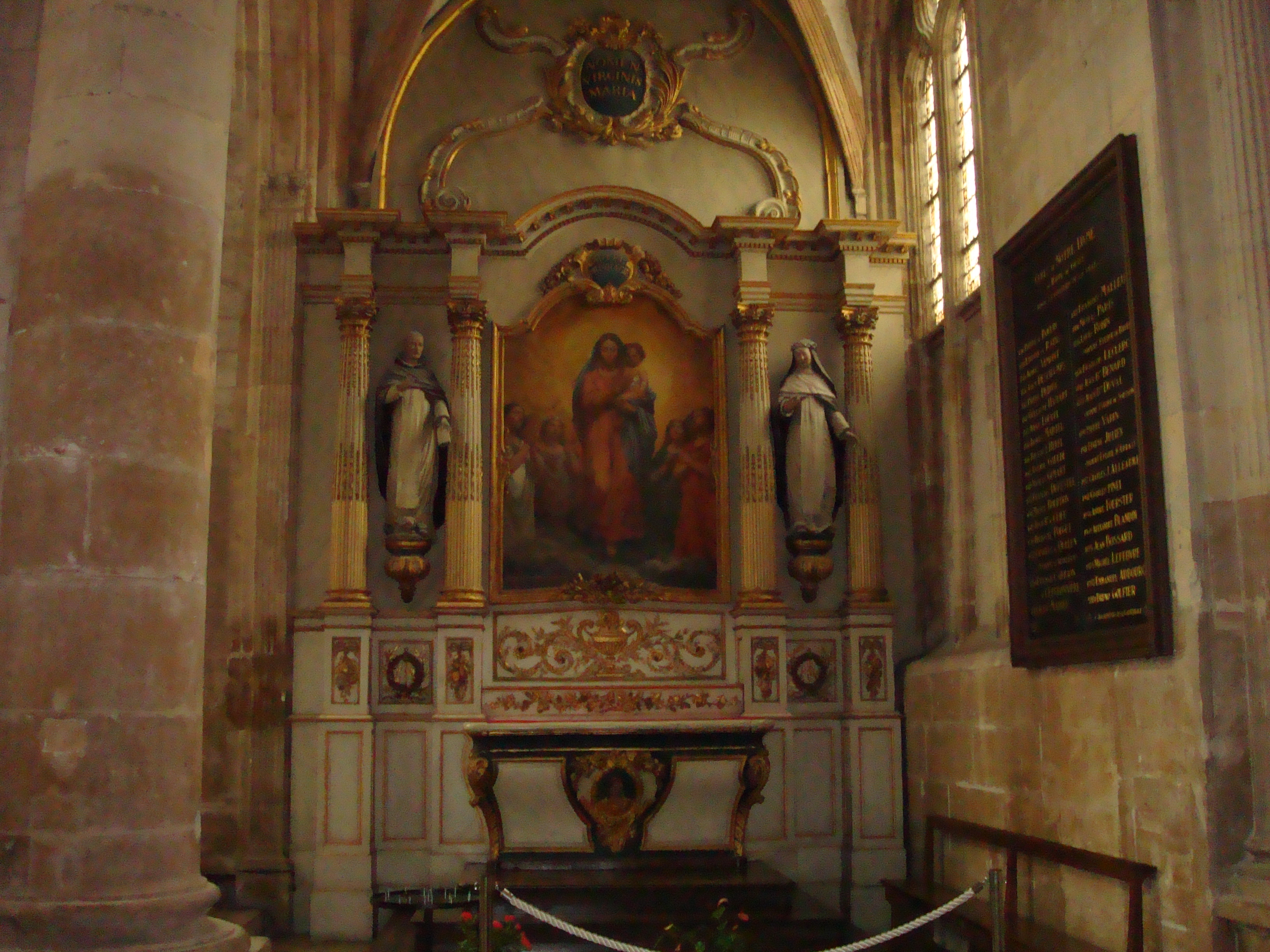 Chapelle terminant la nef latérale du bas-côté sud, dédiée à la Vierge Marie, avec une retable orné d'un grand tableau, où la Vierge Marie tient l'enfant Jésus. Autel et retable en bois, de type classique, colonnes d'ordre corinthiens. Cet autel est appelé "autel privilégié". Deux statues classées M.H.: St Dominique (à gauche), Ste Catherine de Sienne (à droite).